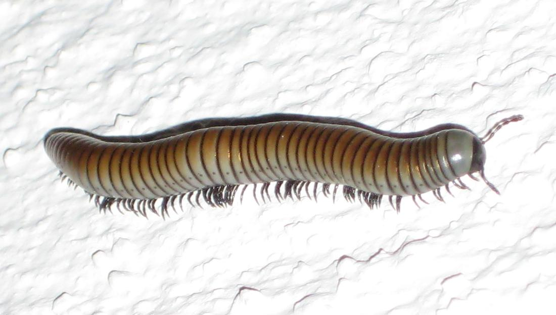 Ommatoiulus rutilans (Finestrat, near Alicante, Spain)